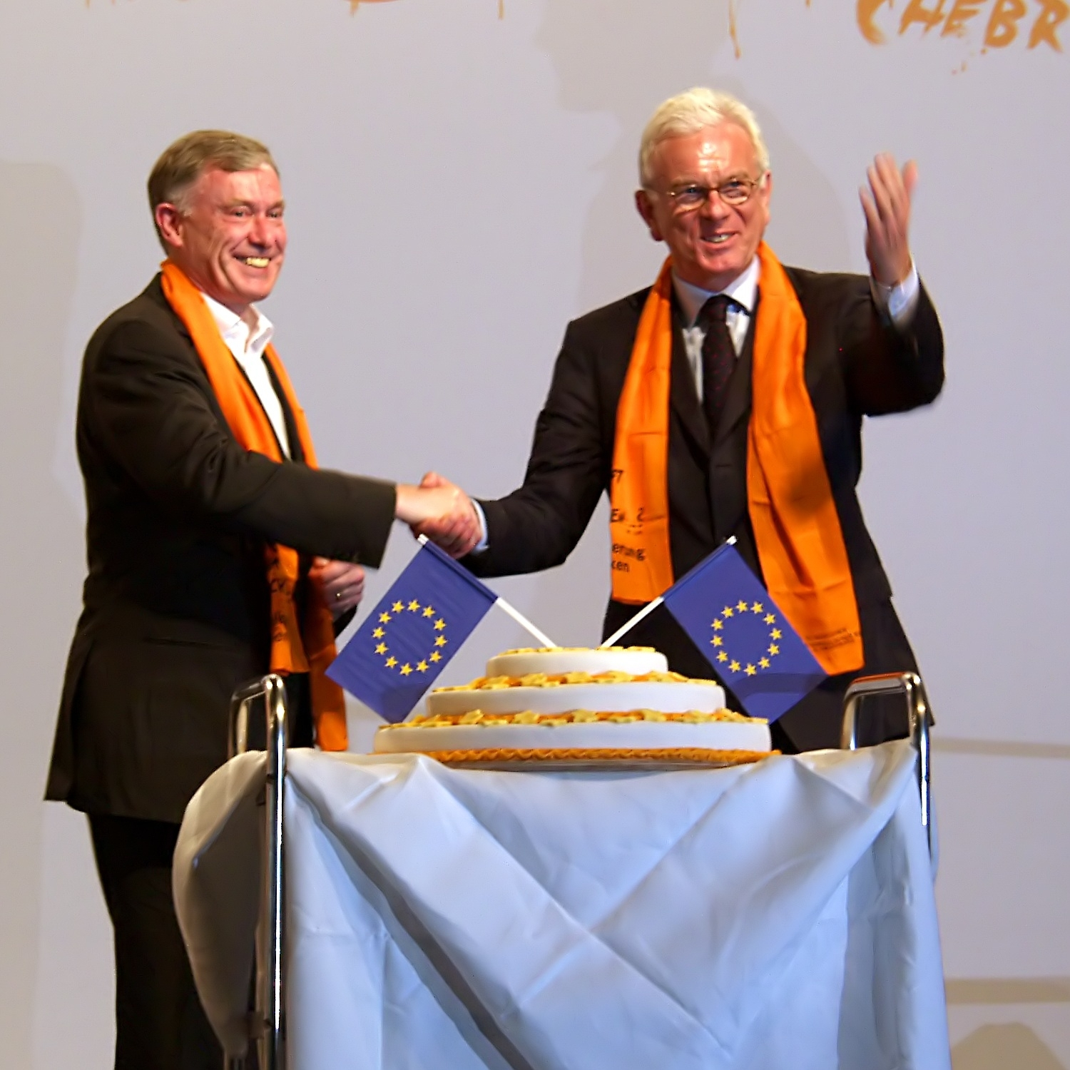 Horst Köhler, Bundespräsident Deutschlands und Hans-Gert Pöttering, Präsident des Europäischen Parlaments, auf dem Deutschen Evangelischen Kirchentag 2007 während der Veranstaltung „Globalisierung gestalten. Die EU als soziales und friedliches Modell“ mit einer Torte zum 50. Geburtstag der Europäischen Union.